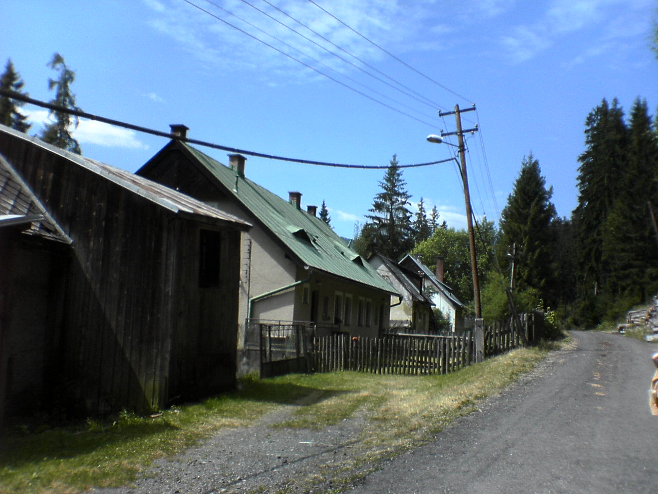 Hamlet of Muránska